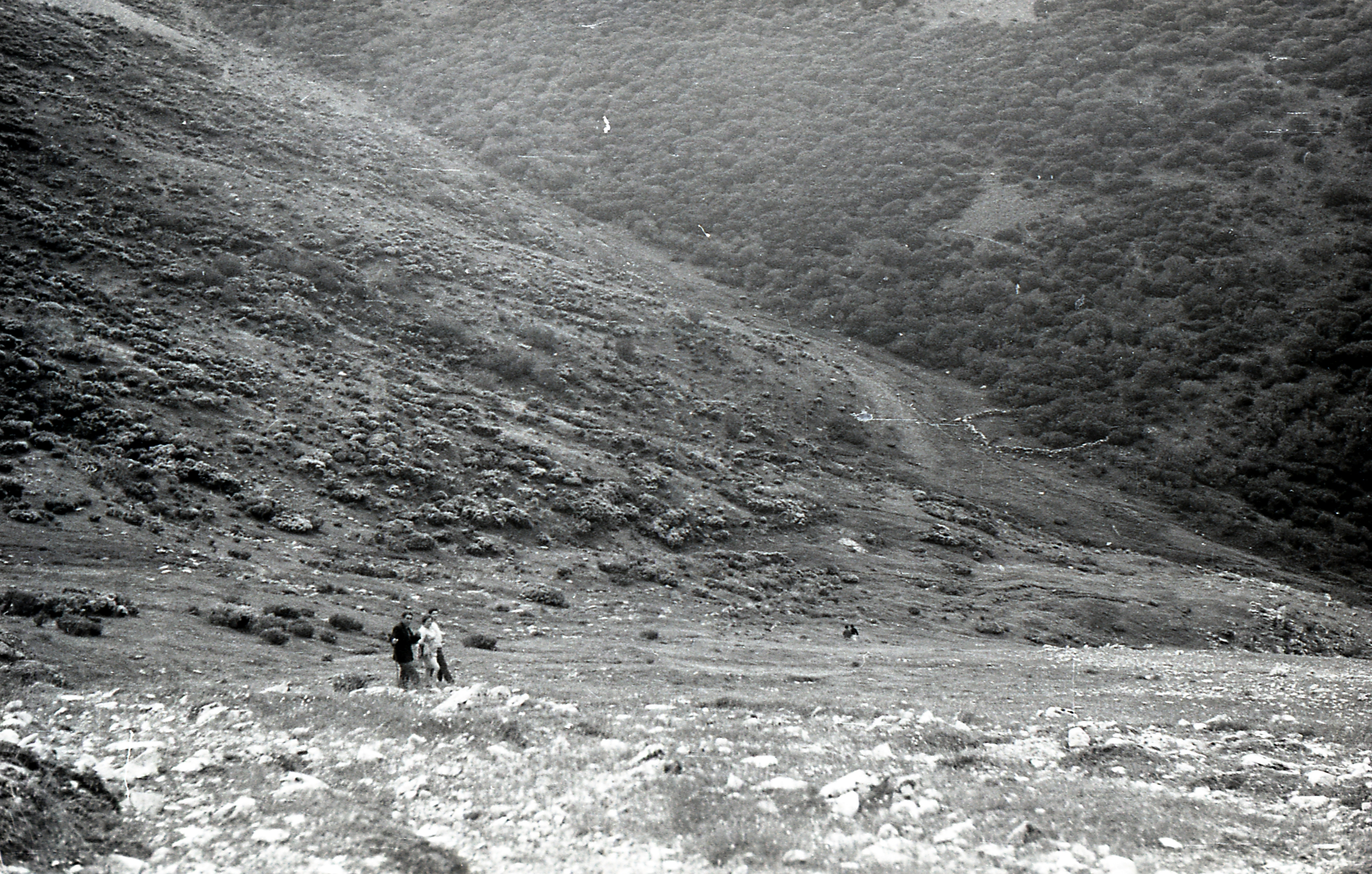 Al fondo se aprecia el cercado del corral de los chinos.